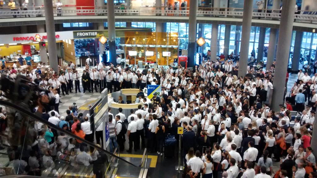 A fotografia de 22 de janeiro de 2015 é um registro da paralisação dos Aeronautas em prol da CCT. Os aeronautas reivindicavam por garantia de escalas justas, melhores condições de trabalho e pela segurança de voo. A categoria não paralisava as atividades desde a década de 80.